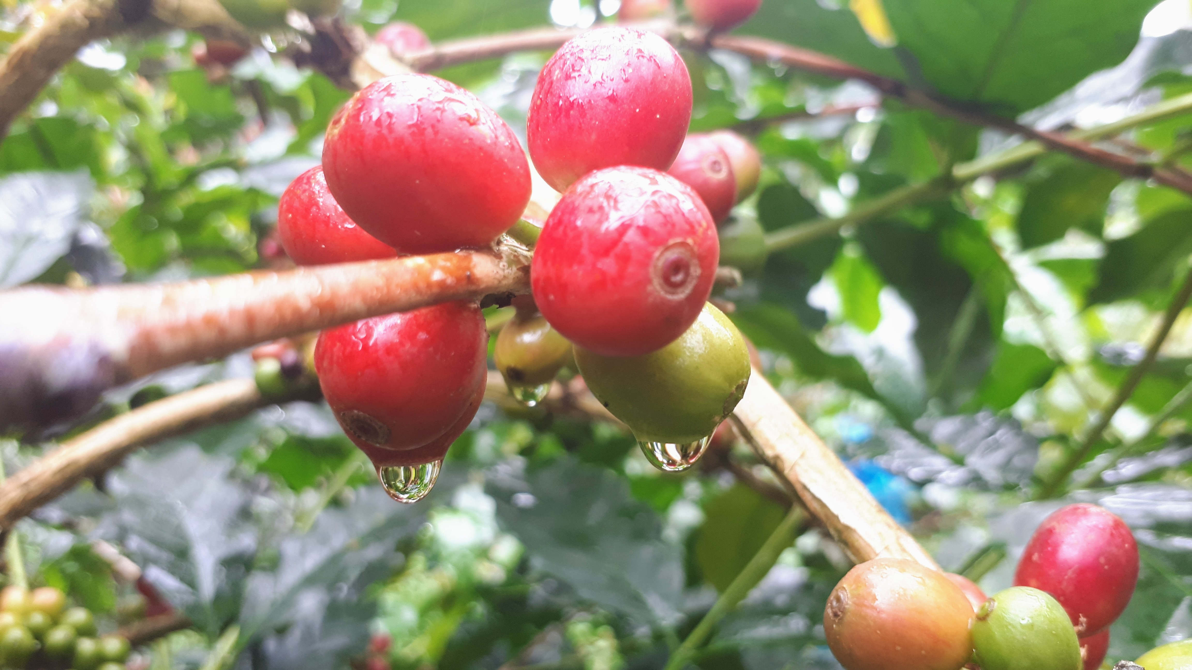 buah kopi arabika